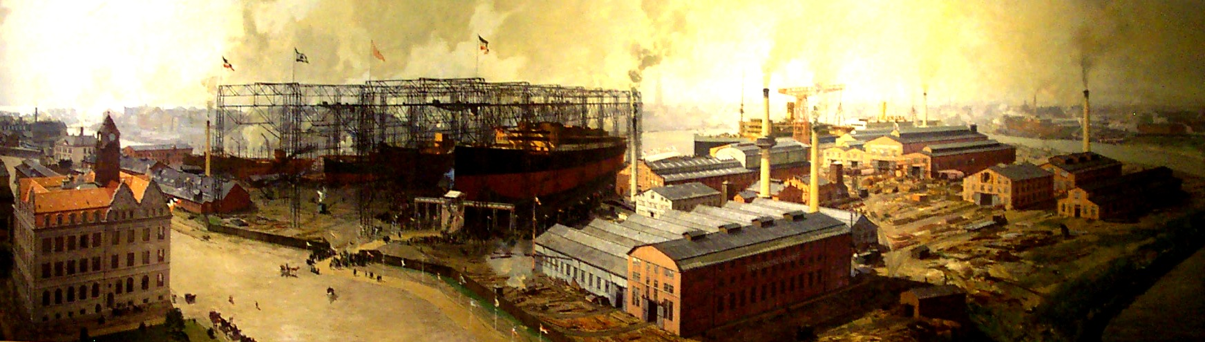 Schiffswerft Tecklenborg in Bremerhaven an der Geeste (Gemälde, 1907).